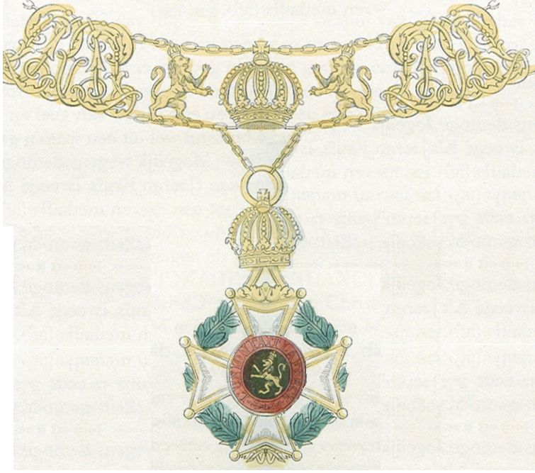 Keten van de Leopoldsorde